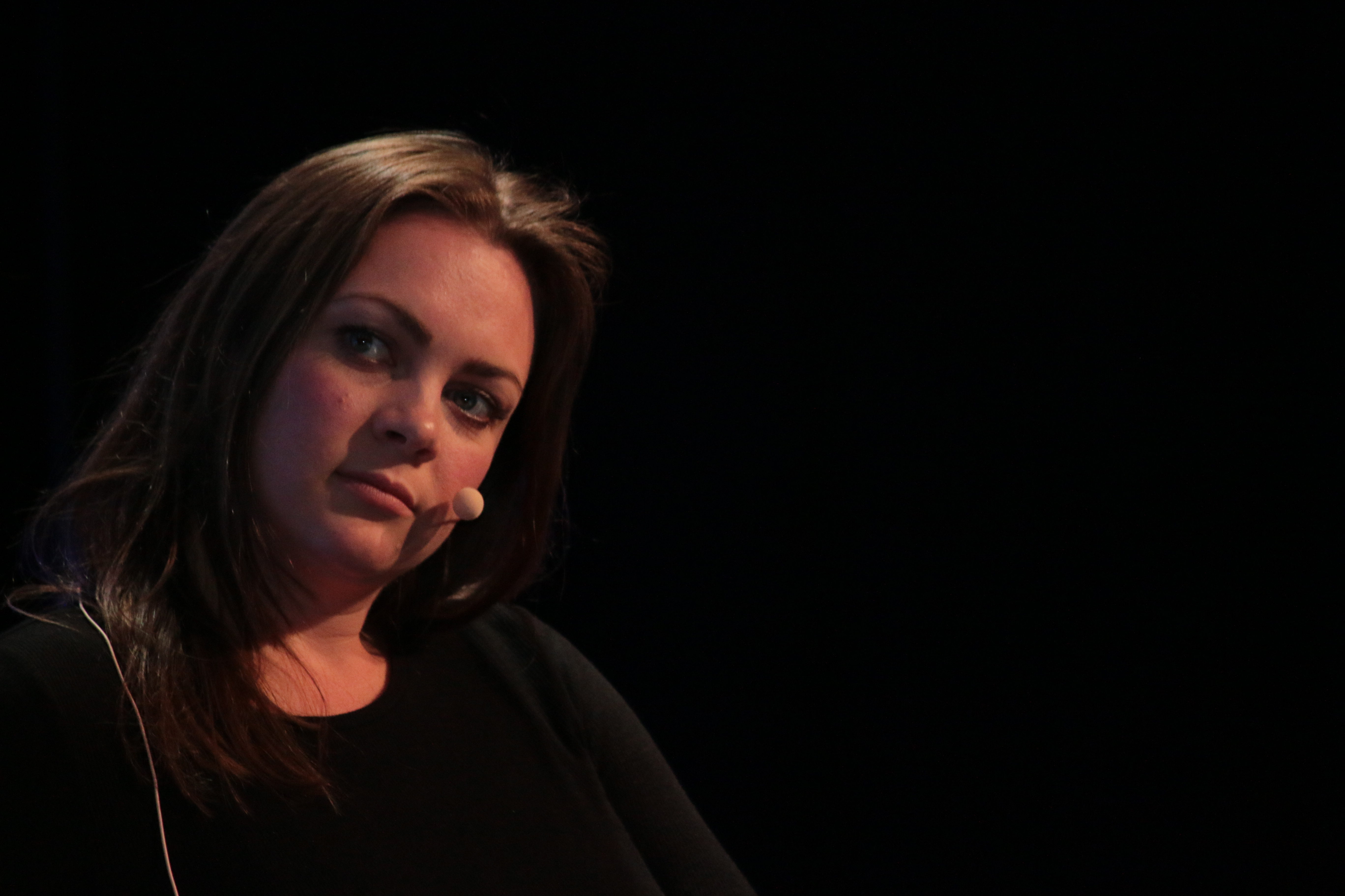 Siri Seljeseth